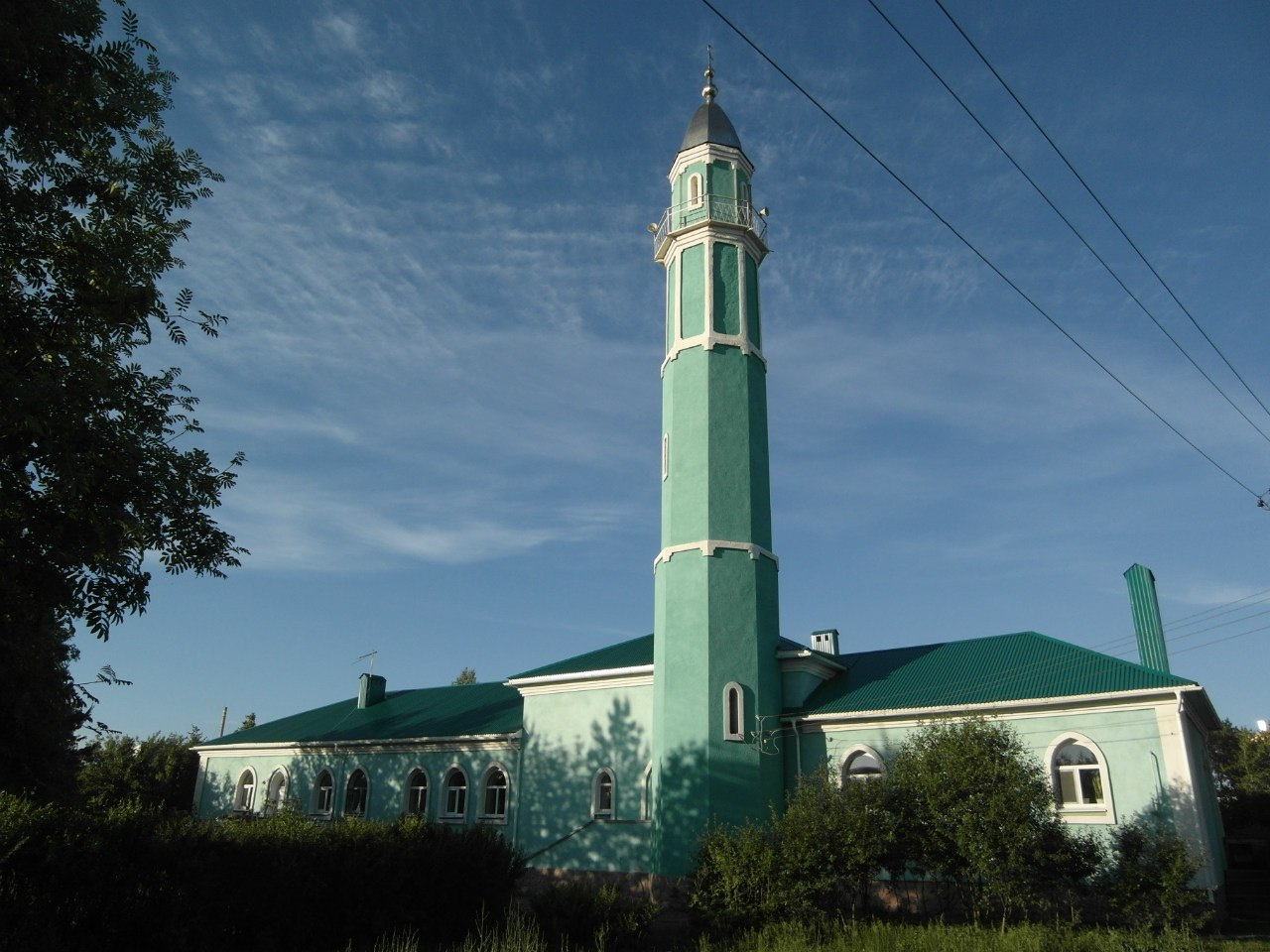 Мечеть "Аль-Фатиха" в городе Туймазы